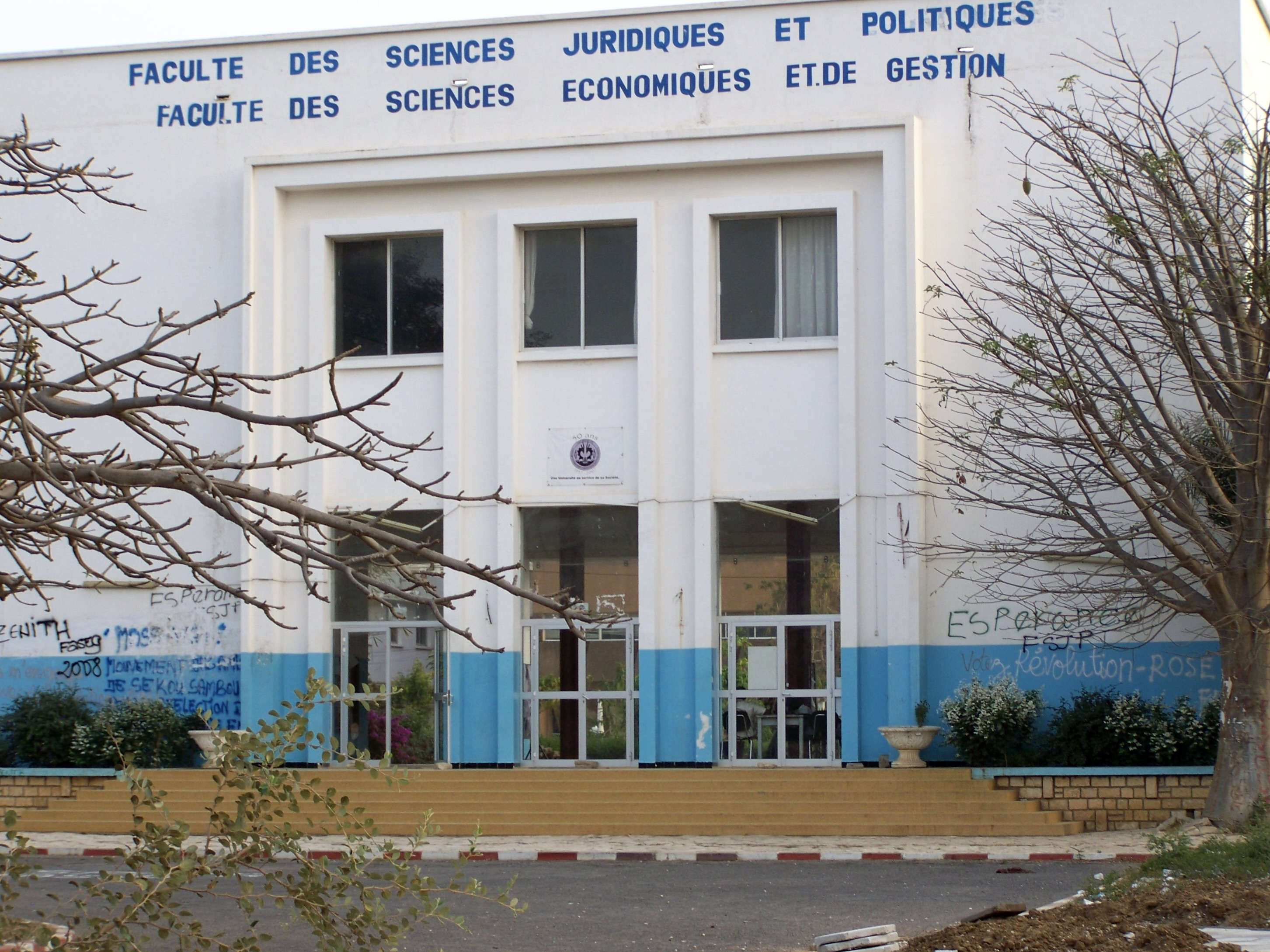 Faculté des sciences juridiques et politiques Faculté des sciences economiques et de gestion de l'université cheikh anta diop de Dakar ( senegal )